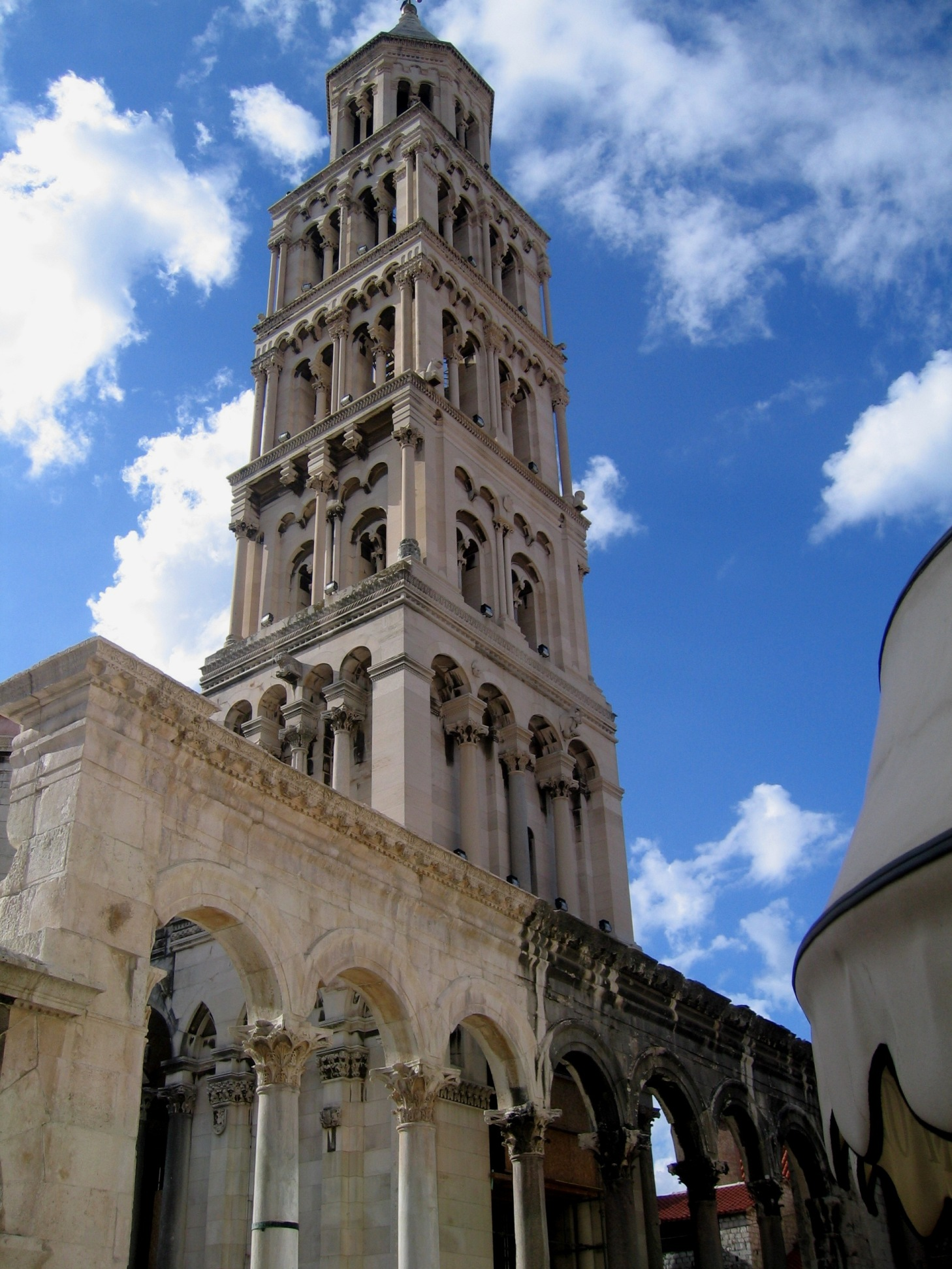 Croatie Split Saint-Domnius Campanile